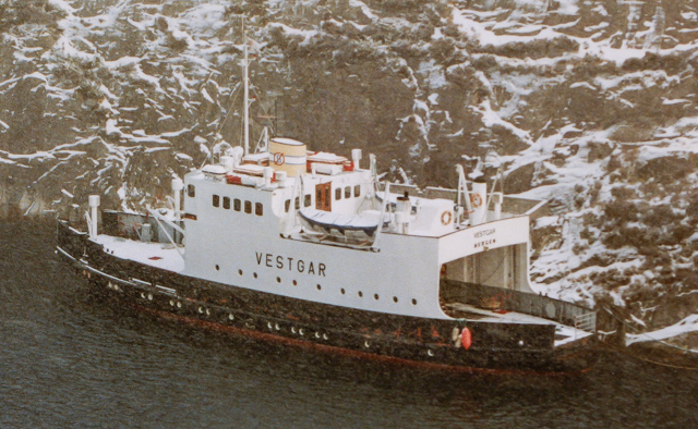 Vestgar i opplag